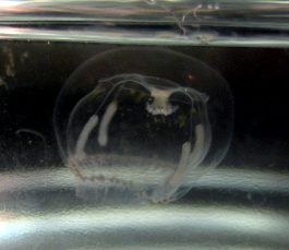 Clytia gregaria, lateral view